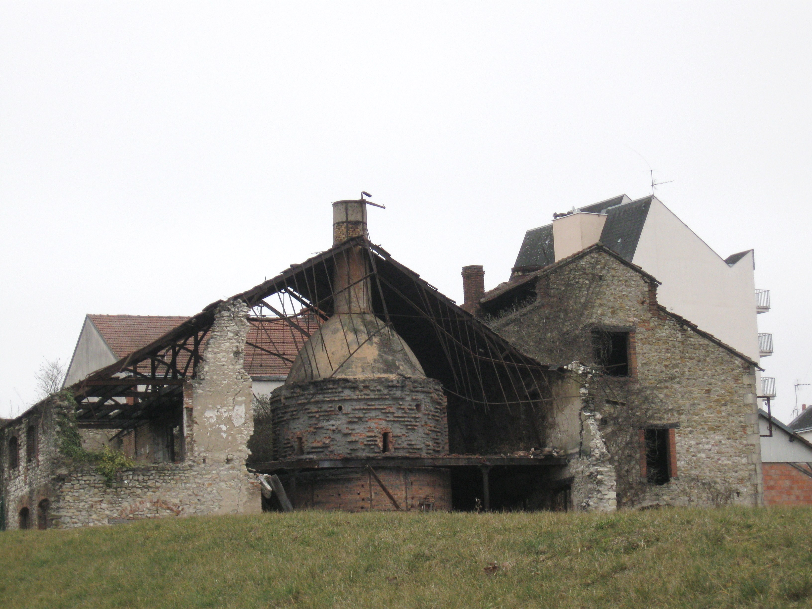 Bâtiment abritant un four rond à globe de l'ancienne fabrique de porcelaine Gaucher, Vierzon, Cher, France.